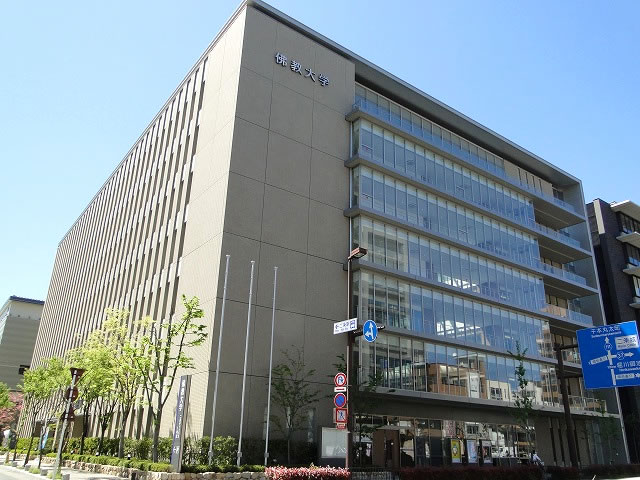 佛教大学 二条キャンパス 一号館